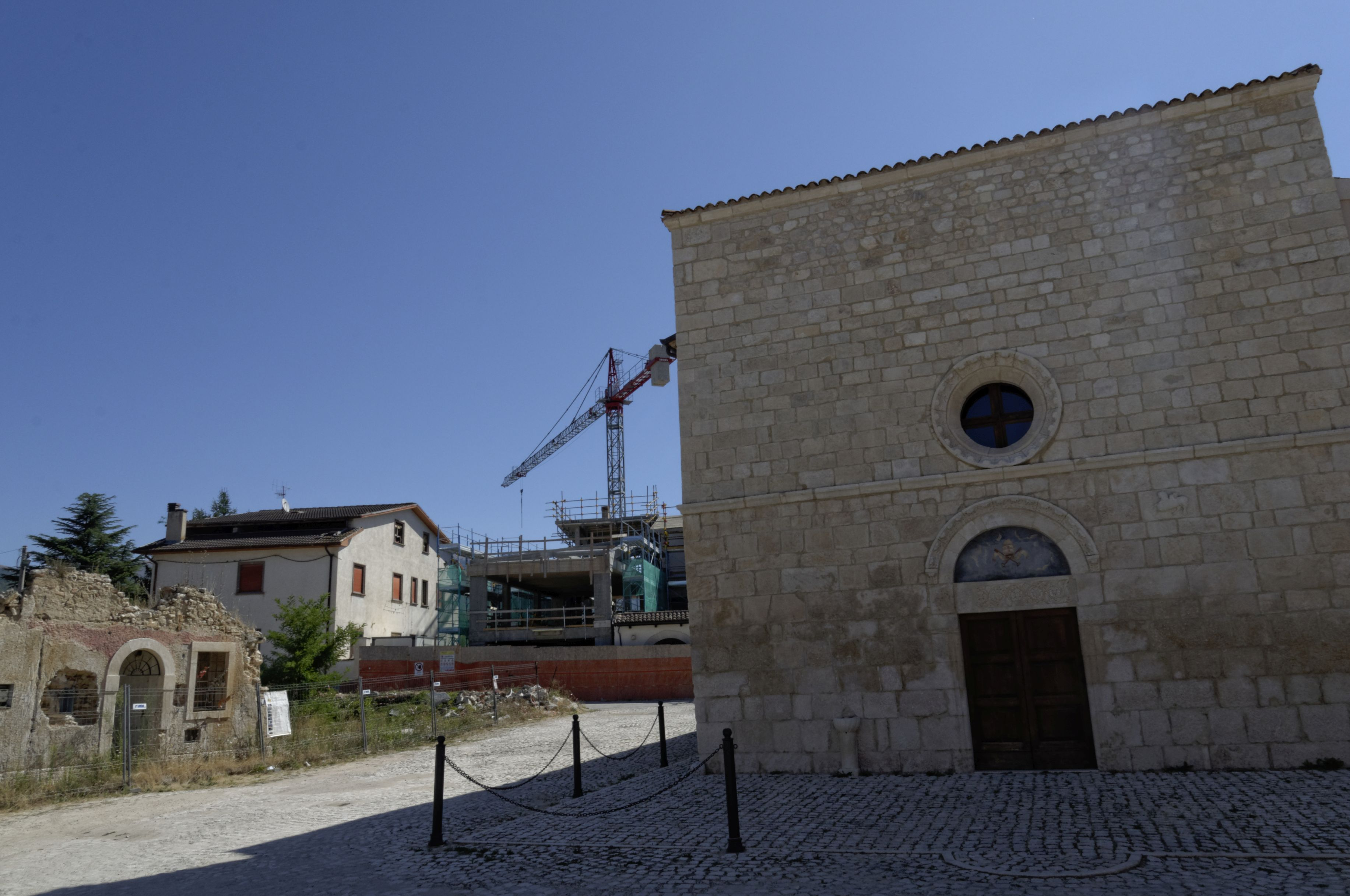 Onna (L’Aquila) 2017 Dieses Foto entstand in Zusammenarbeit mit Stadtbesichtigungen.de Die Seiten Stadtbesichtigungen.de, der dazugehörige Reise Blog sowie die Facebookseite: Stadtbesichtigungen Rom dürfen dieses Bild für Ihre Veröffentlichungen ohne den Hinweis auf Wikipedia, Commons bzw der Lizenz verwenden. Die Verantwortlichen habe von mir (Ra Boe) die Originaldaten zur freien Verfügung übermittelt bekommen.